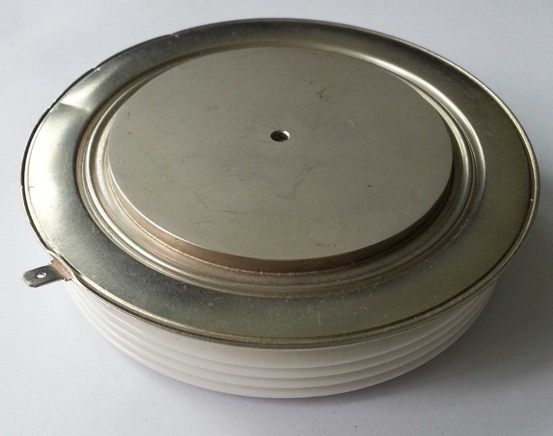 Netzfrequenzthyristor Westcode (mittlerweile IXYS) N3476TC420; Sperrspannung 4200 V, Bemessunsgdauerstrom @ 55°C Sperrschichttemperatur: 3476 A